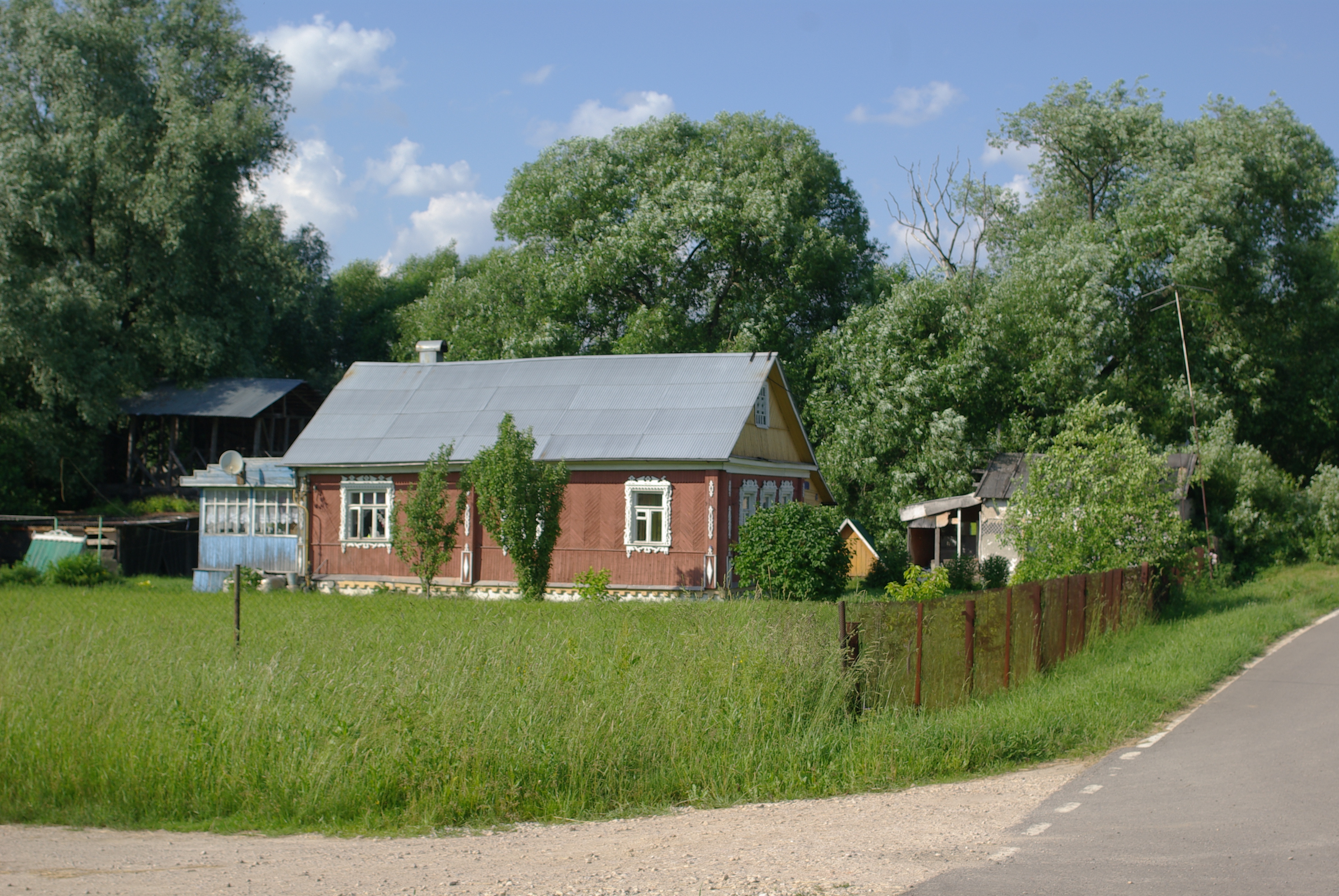 Рудины